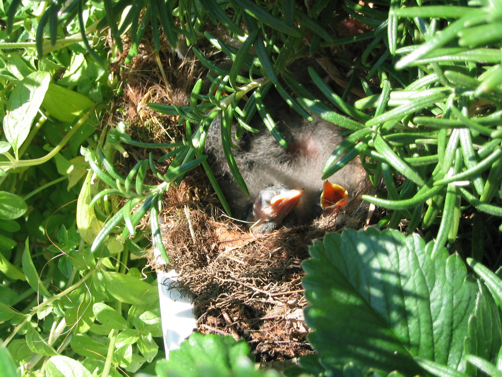 Eier der Bachstelze, nistend in einem Balkonkasten. Eigene Aufnahme